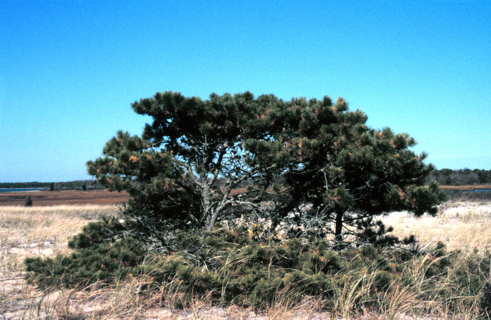 Species Pinus rigida deutsch: Pechkiefer english: pitch pine aus der englischen Wikipedia (Pitch Pine) Joan Muller, Waquoit Bay NERR 1987 Ca. Ort der Aufnahme: Waquoit Bay, Massachusetts Pinus rigida, Waquoit Bay, Massachusetts - NOAA photo [1]